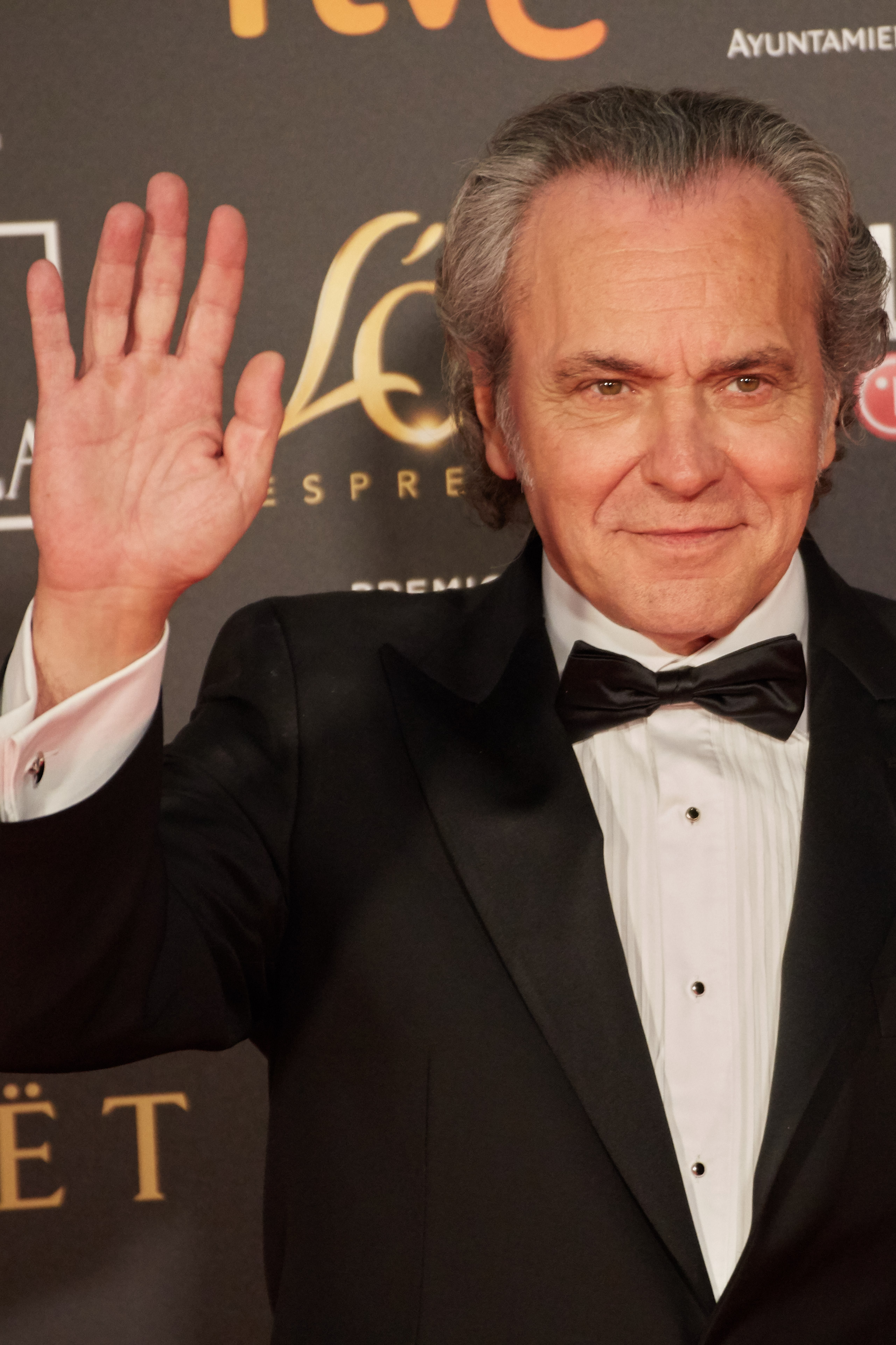 José Coronado en la alfombra roja de los Premios Goya celebrados en Sevilla en Febrero 2019. Nominado a Mejor Interpretación Masculina Protagonista por el papel de Jaime Jiménez en "Tu hijo"